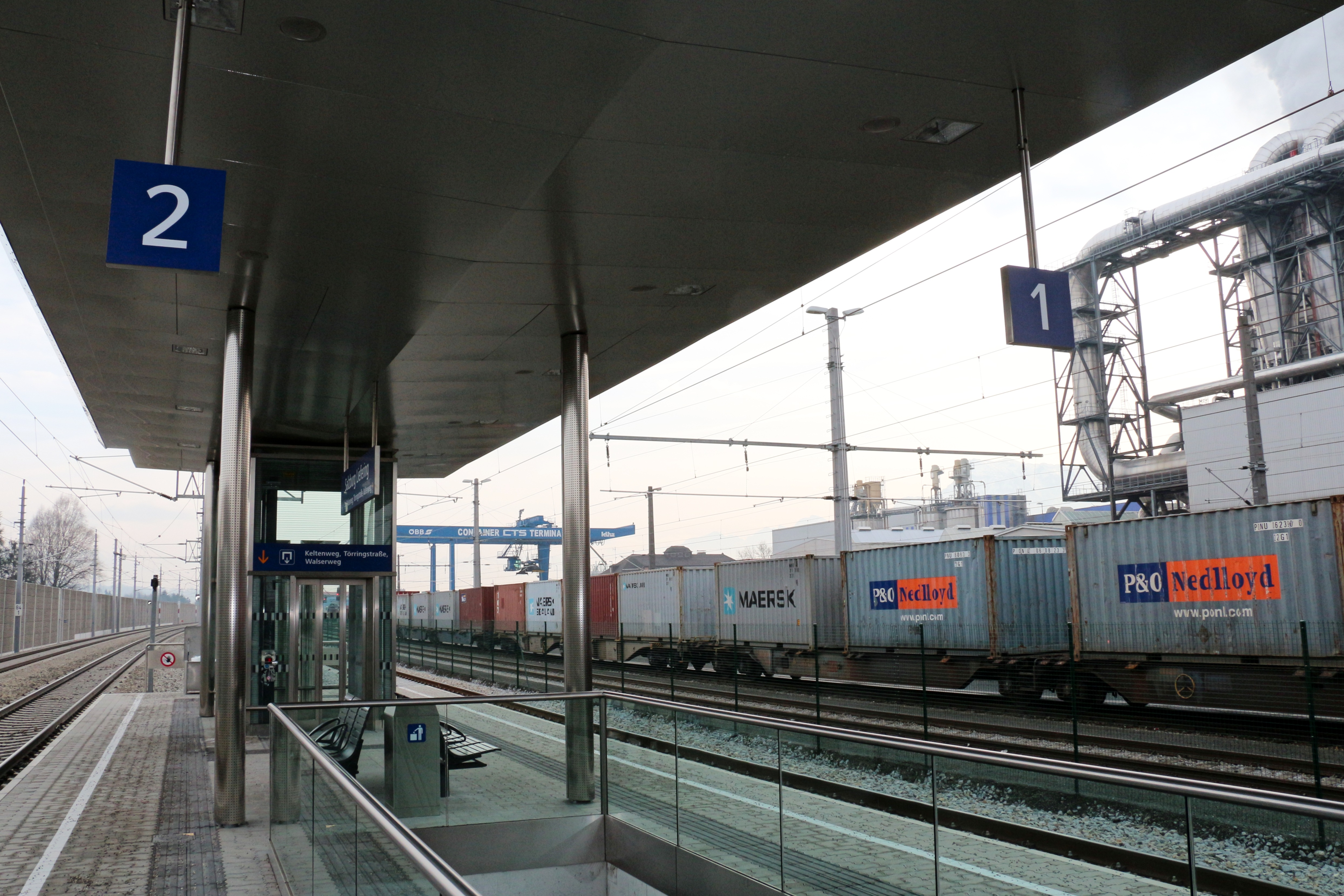 Die im Dezember 2013 in Betrieb genommene S-Bahn-Haltestelle Salzburg-Liefering; Bahnsteig. Gegenüber Teile des Container Terminals Salzburg und der Fabriksanlage der Firma Kaindl.